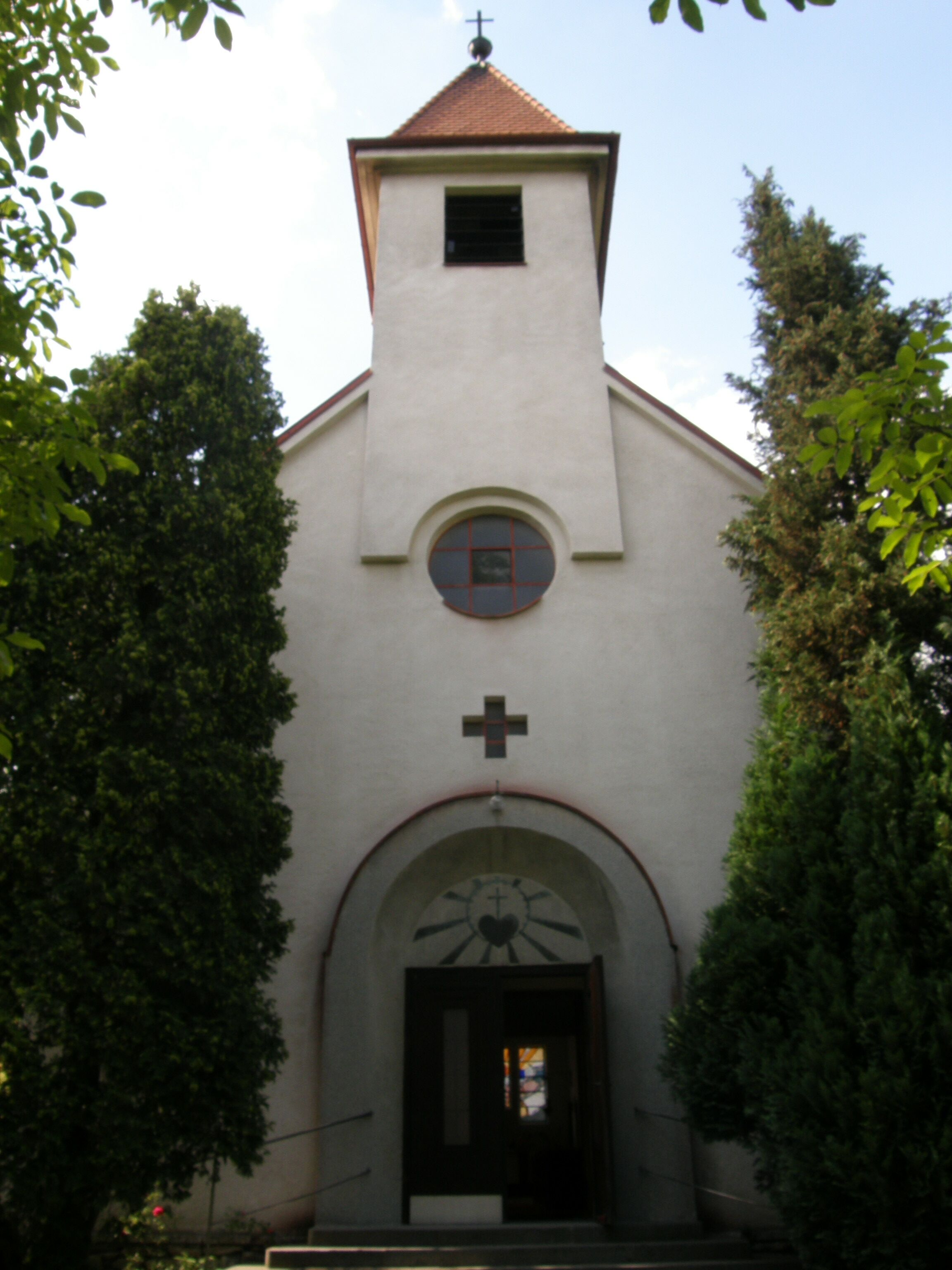 Kostel Božského Srdce Páně v Olomučanech na Blanensku